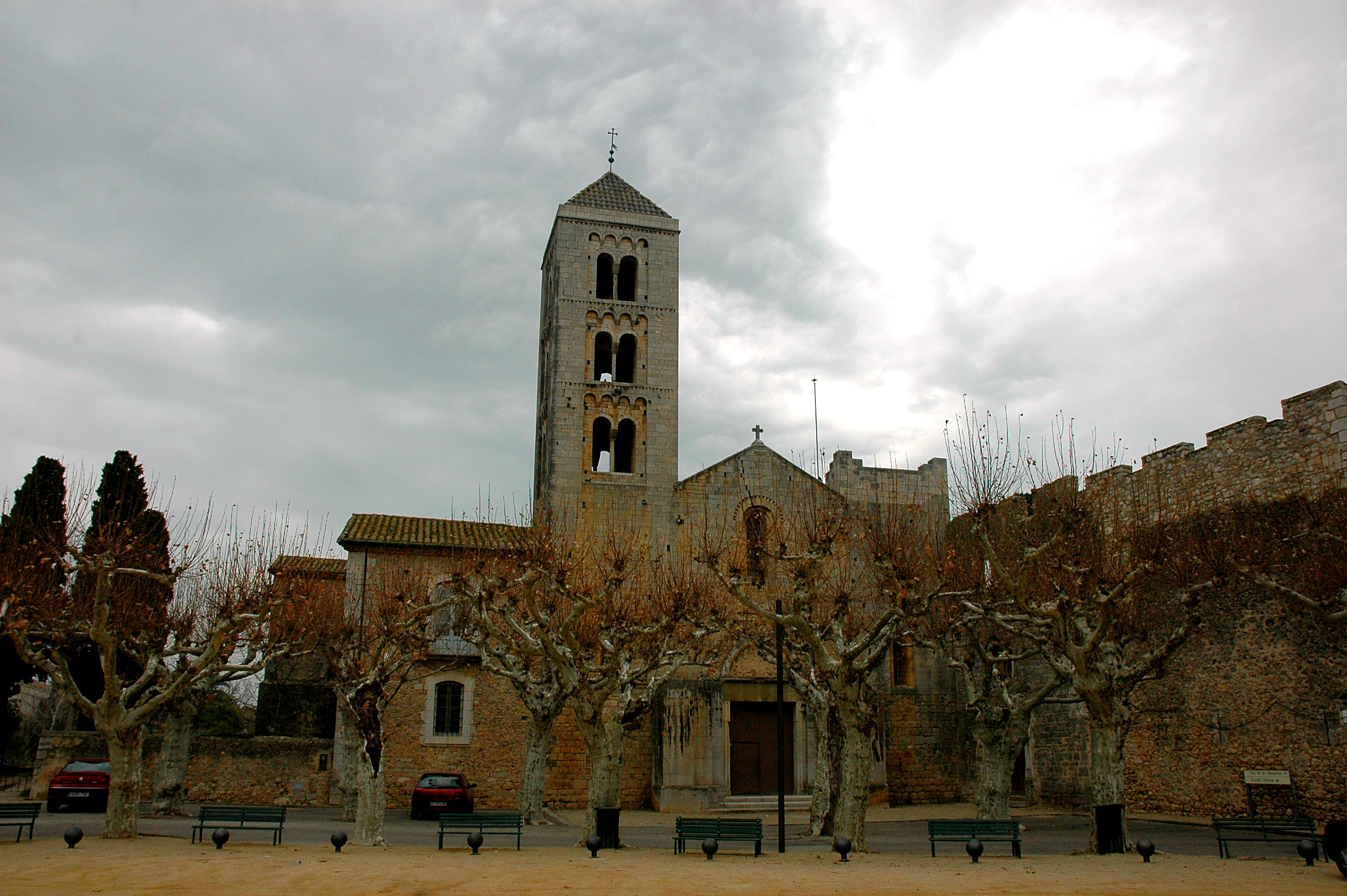 Santa Maria de Vilabertran - General